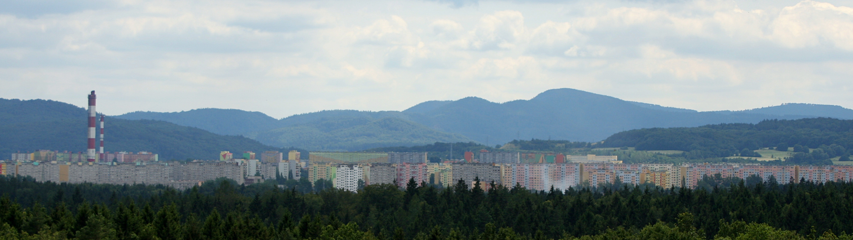 Panorama dzielnicy Wałbrzycha Podzamcze.